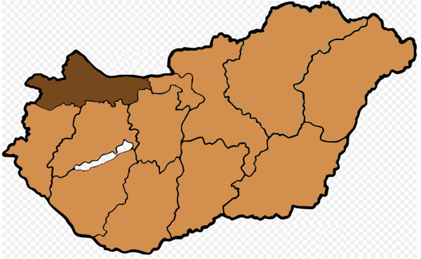 Mappa dell'arcidiocesi cattolica di Gyor, in Ungheria. Lavoro personale eseguito da questa immagine di Commons.